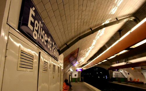 Metro Station Eglise de Pantin, Paris (France)